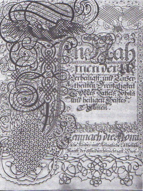 Titulní list slavnostního uznání pragmatické sankce moravskými stavy. Barokní iniciála 1720.